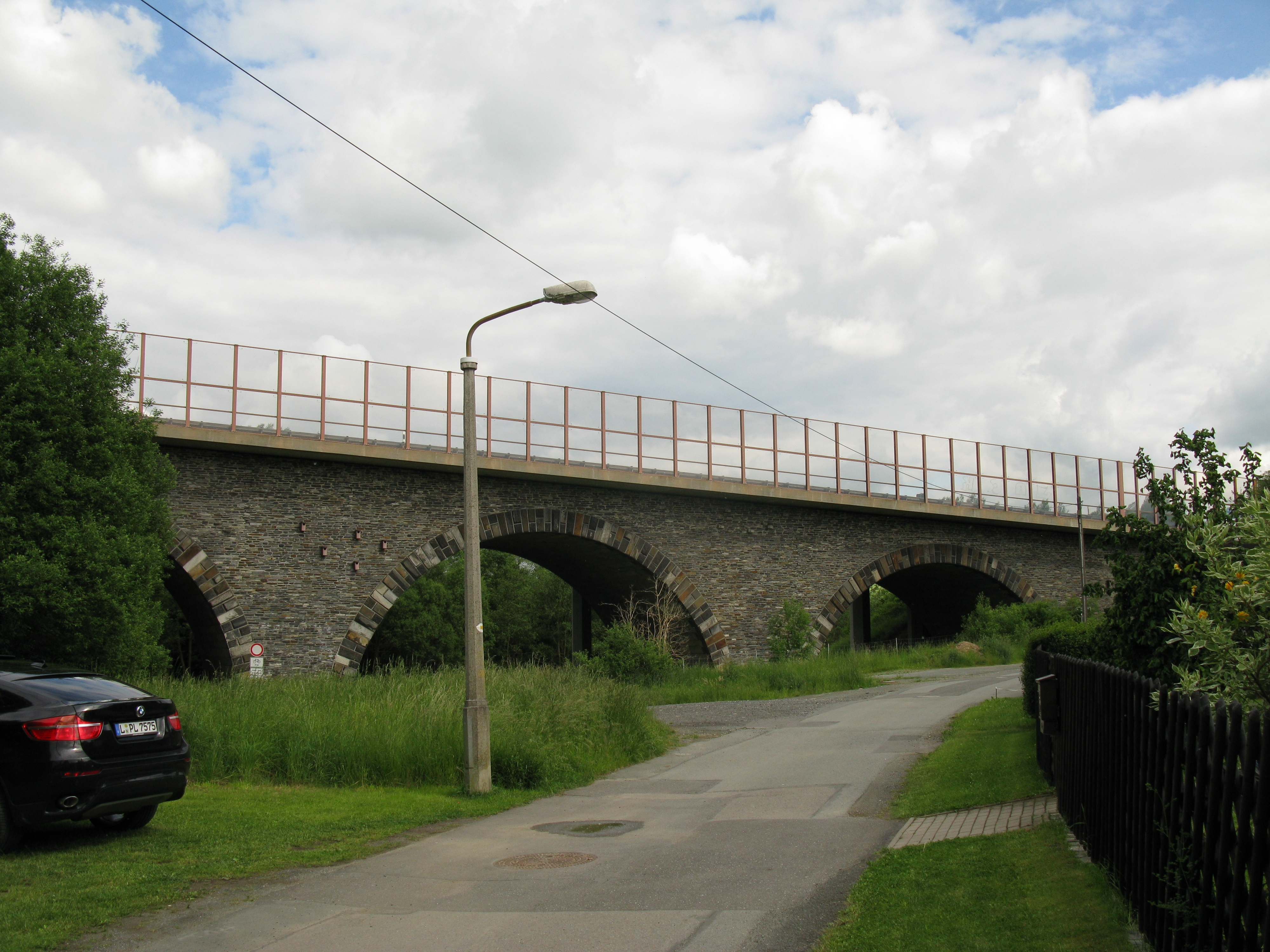 Plauen- =Kleinfriesen, denkmalgeschützte Friesenbachtalbrücke an der A72.